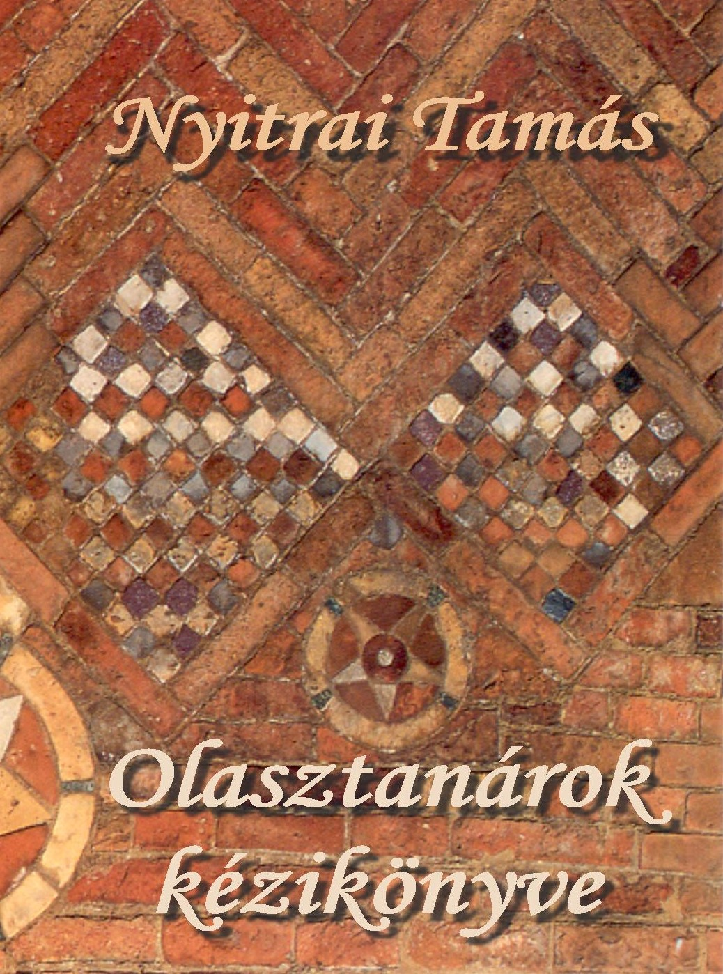 2002-ben kiadott olasztanári kézikönyvem borítója